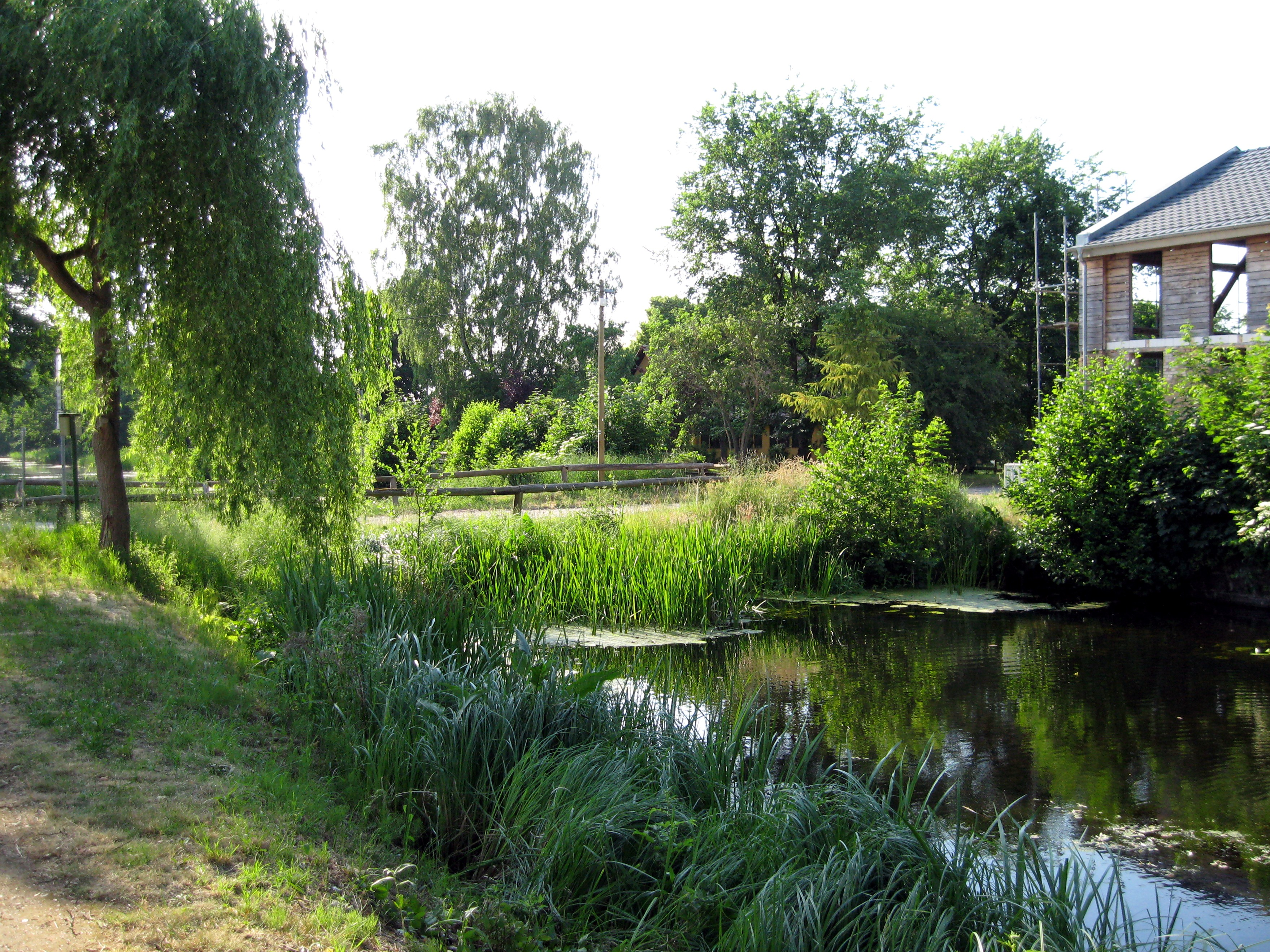 Damm der Forststraße am Langen Trödel in Zerpenschleuse, Gemeinde Wandlitz, Landkreis Barnim, Land Brandenburg, Deutschland